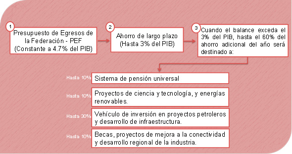 Fines del Fondo Mexicano del Petroleo